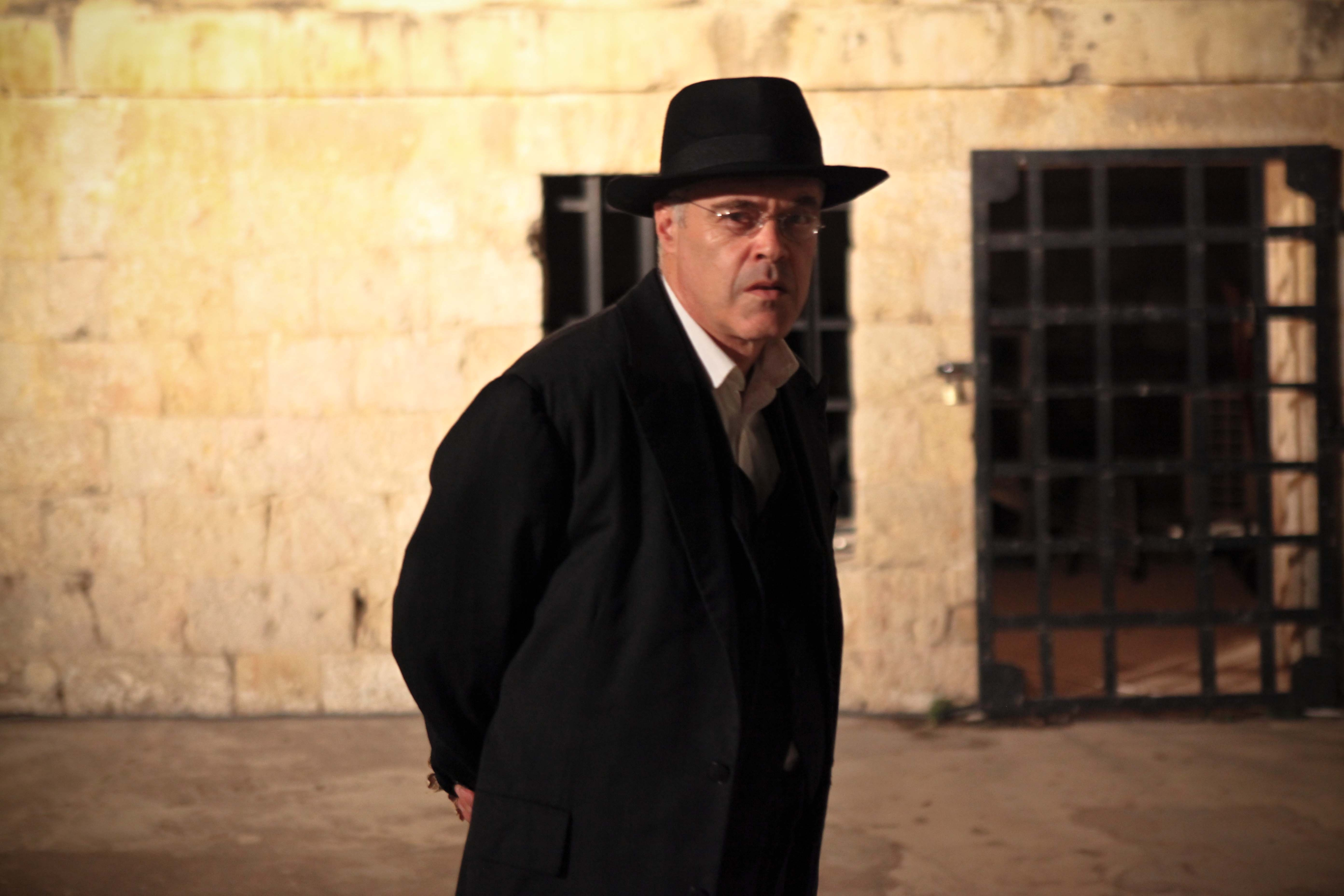 דורון תבורי בתפקיד גוסטב מאהלר בהצגה "אלמה" מאת יהושע סובול, בבימויו של פאולוס מאנקר